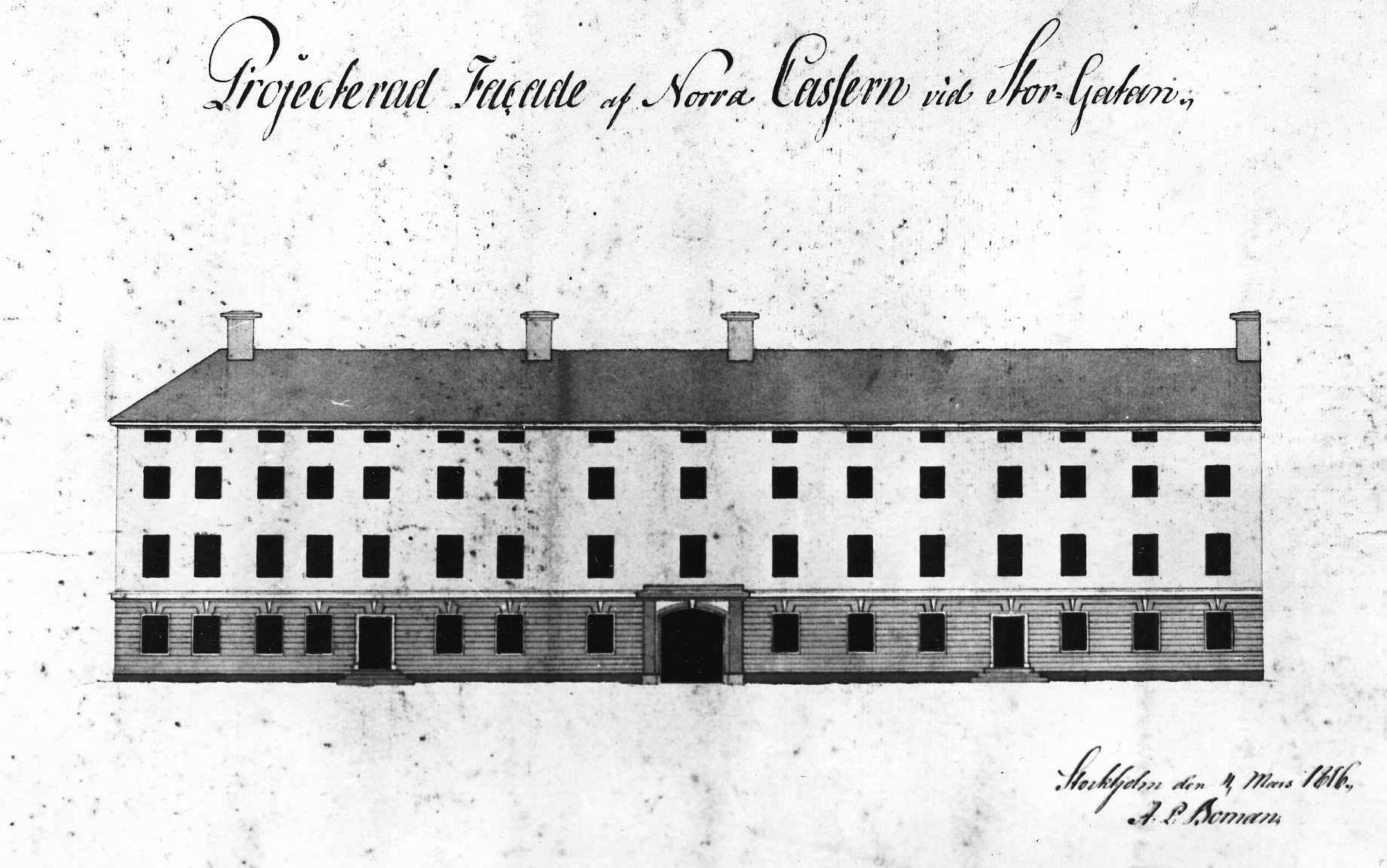 Projekt till Stadens norra kasern, större huvudbyggnad mot Storgatan (ej utfört)